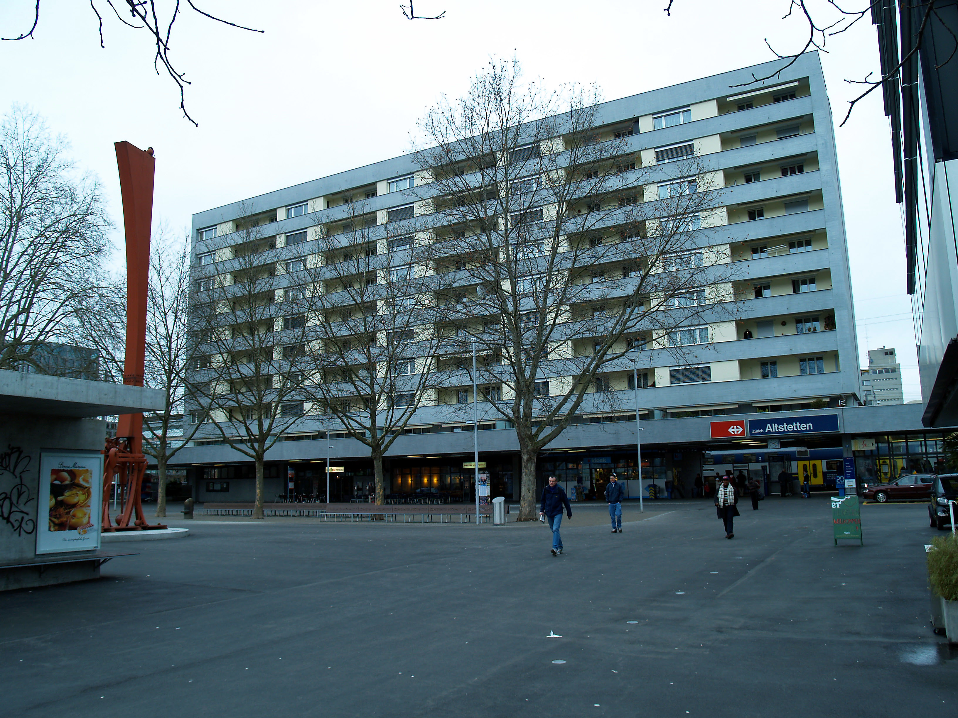 Aufnahme des Bahnhofplatzes von Zürich Alstetten am 19.02.2006. Durch S. Hinni, eigenes Bild Sculpture: IBM Stengel (1991) by Bernhard Luginbühl